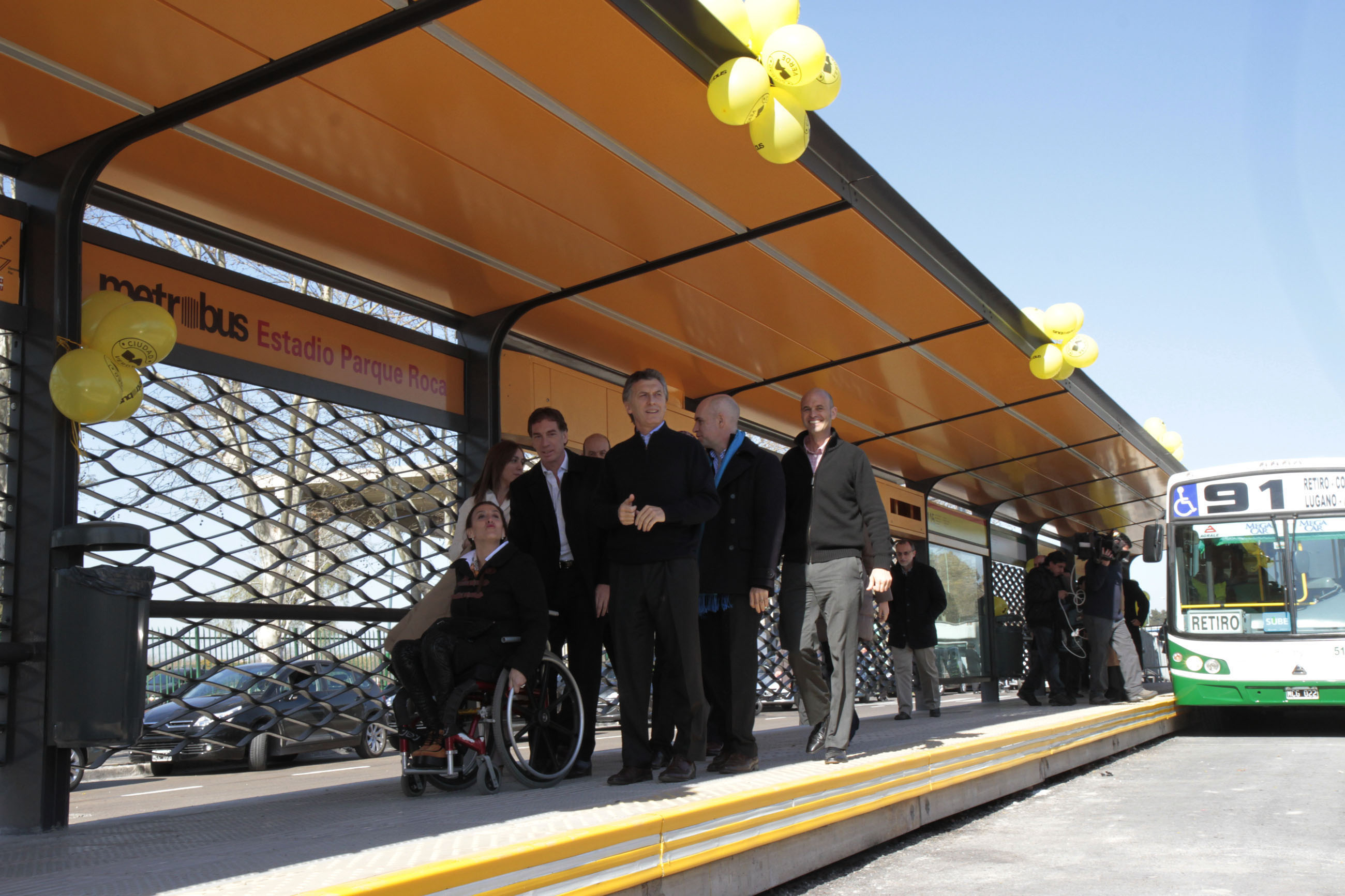 Buenos Aires. Agosto 14 de 2013. El jefe de Gobierno porteño, Mauricio Macri, inauguró hoy el Metrobús que une Puente La Noria con Constitución y que beneficiará diariamente a unos 250 mil usuarios de los barrios del sur de la Ciudad y del conurbano bonaerense, quienes verán notoriamente reducidos sus tiempos de traslados. Foto Mariana Sapriza-gv/GCBA.